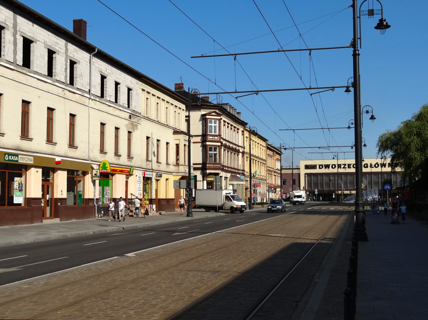 Ulica Dworcowa w Bydgoszczy na odcinku od ul. Królowej Jadwigi do dworca PKP